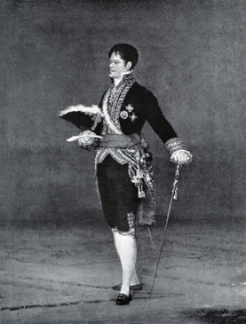 Retrato del aristócrata, militar y politico español José Miguel de Carvajal y Manrique (1771-1828), II duque de San Carlos y conde de Castillejo y del Puerto. Posible réplica reducida del retrato original